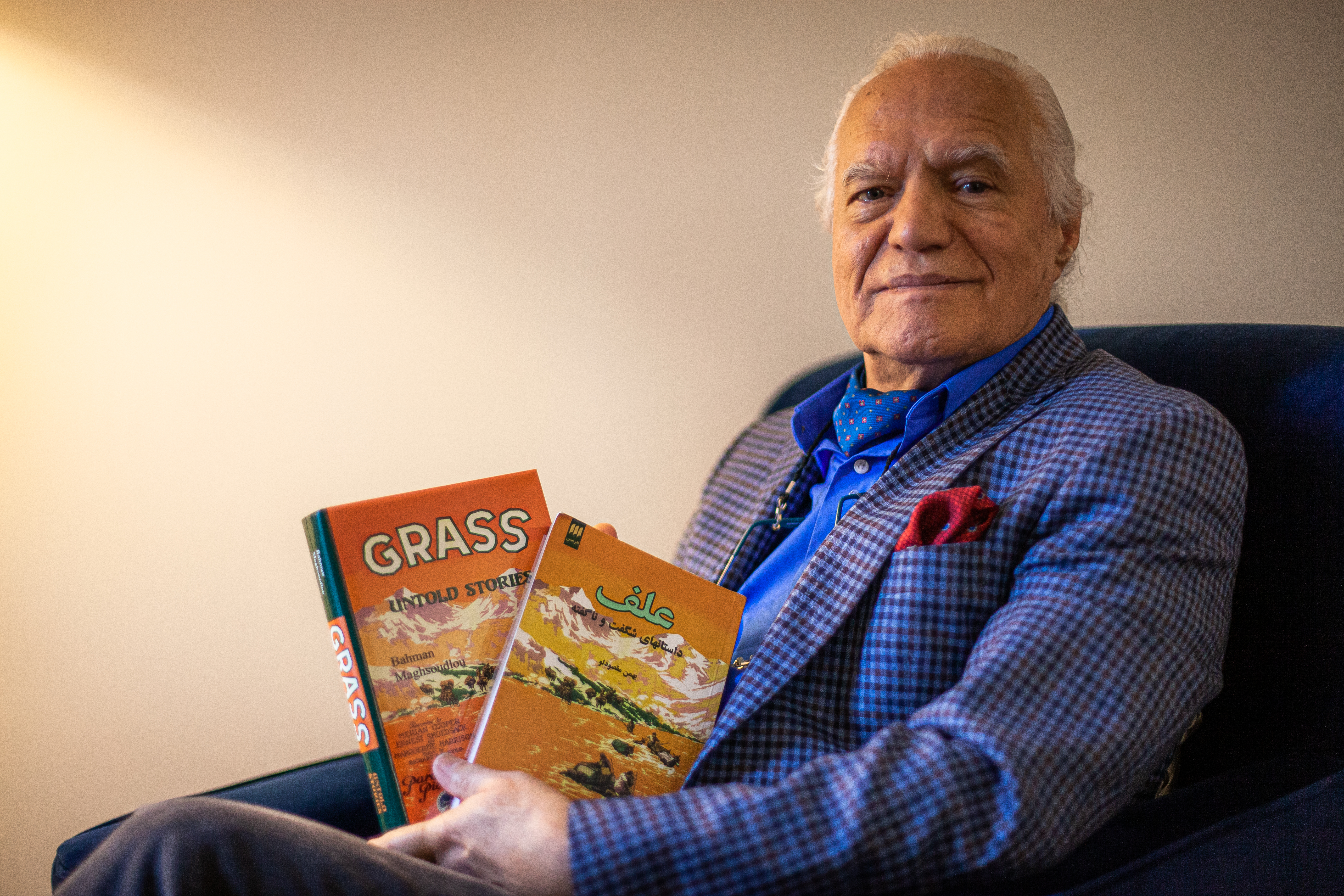 این عکس ها در شهر تورنتو توسط پوریا افخمی ثبت شده است.